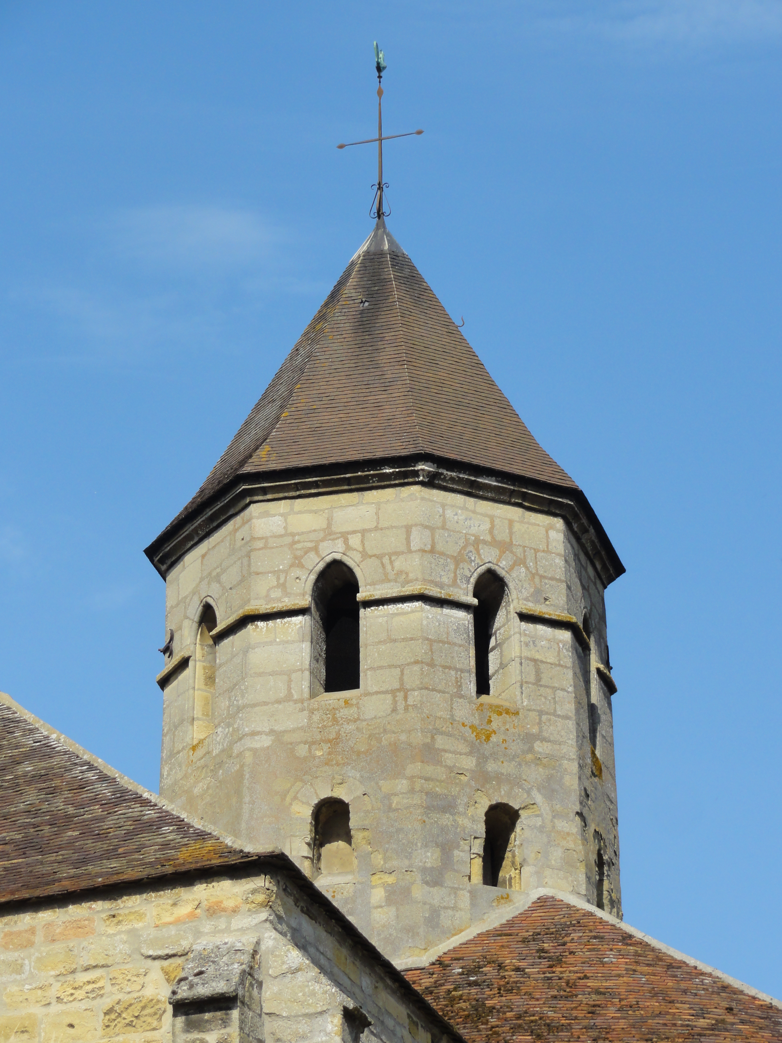 Église Saint-Pierre-ès-Liens de Condécourt (voir titre).